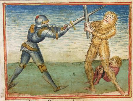 "Sigenot", Dietrich von Bern im Kampf mit dem Wilden Mann, zu Füßen des Wilden Mannes der Zwerg Baldung, Codex aus der Werkstatt des Ludwig Henfflin